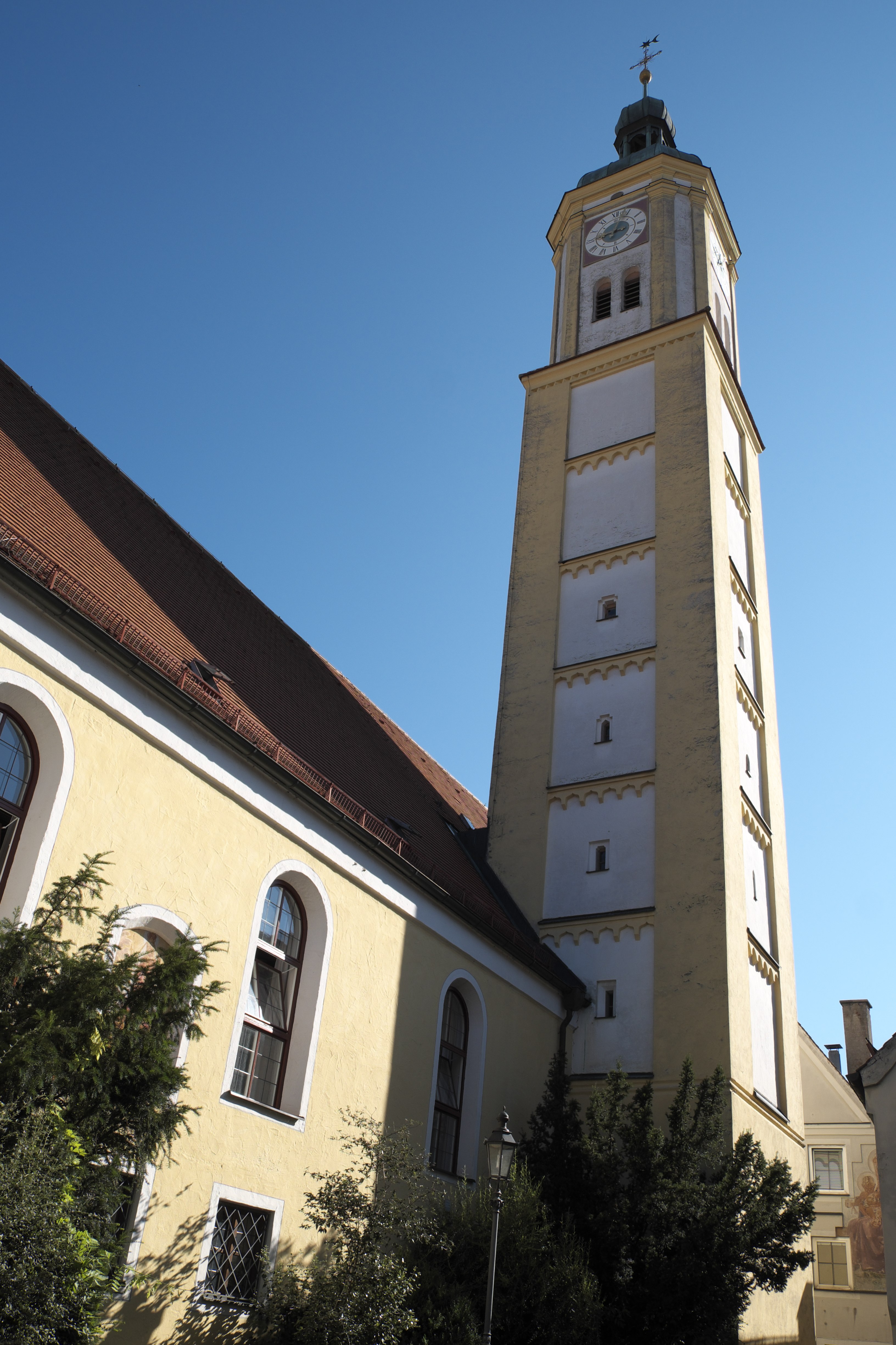 Turm der ehemaligen Kirche St. Silvester in Mindelheim im Landkreis Unterallgäu (Bayern/Deutschland), heute Turmuhrenmuseum